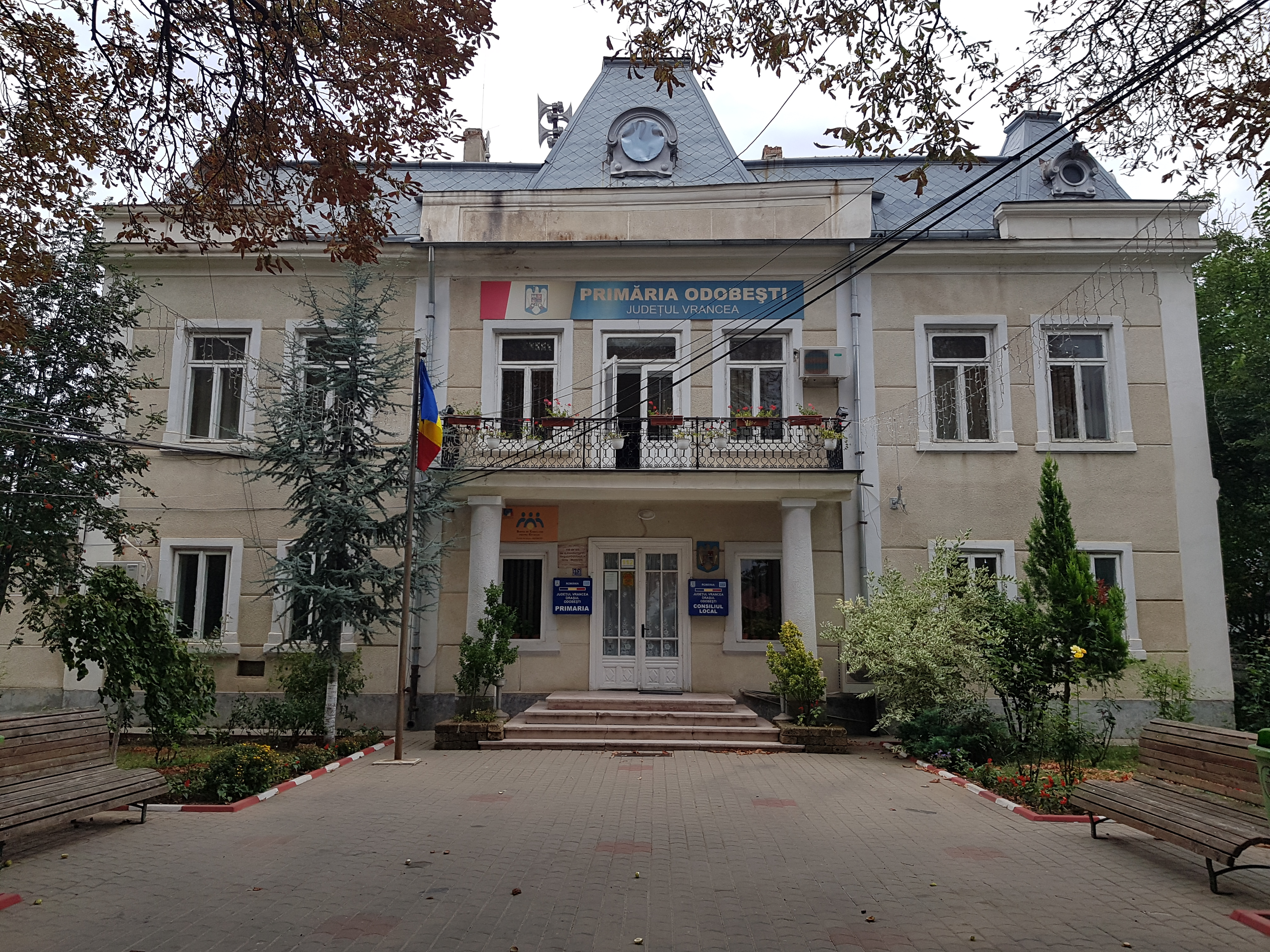 Primăria Odobești